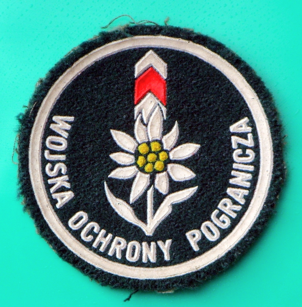 Naszywka Brygady WOP